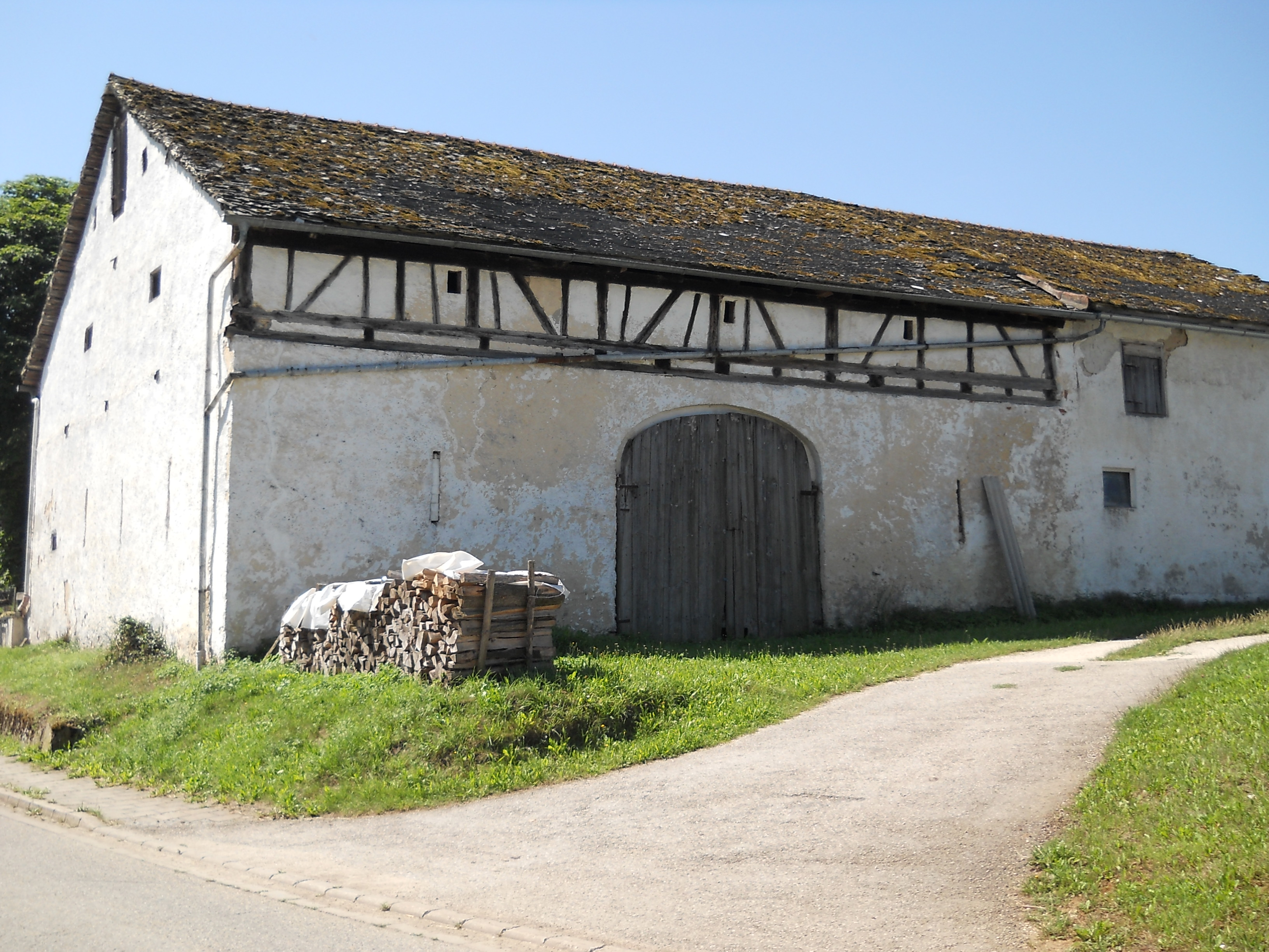 Jura-Stadel in traditioneller Bauweise mit Kalkplattendach in Krut (Gemeinde Kipfenberg im Landkreis Eichstätt in Oberbayern). Ansicht von Nordosten. This is a photograph of an architectural monument.